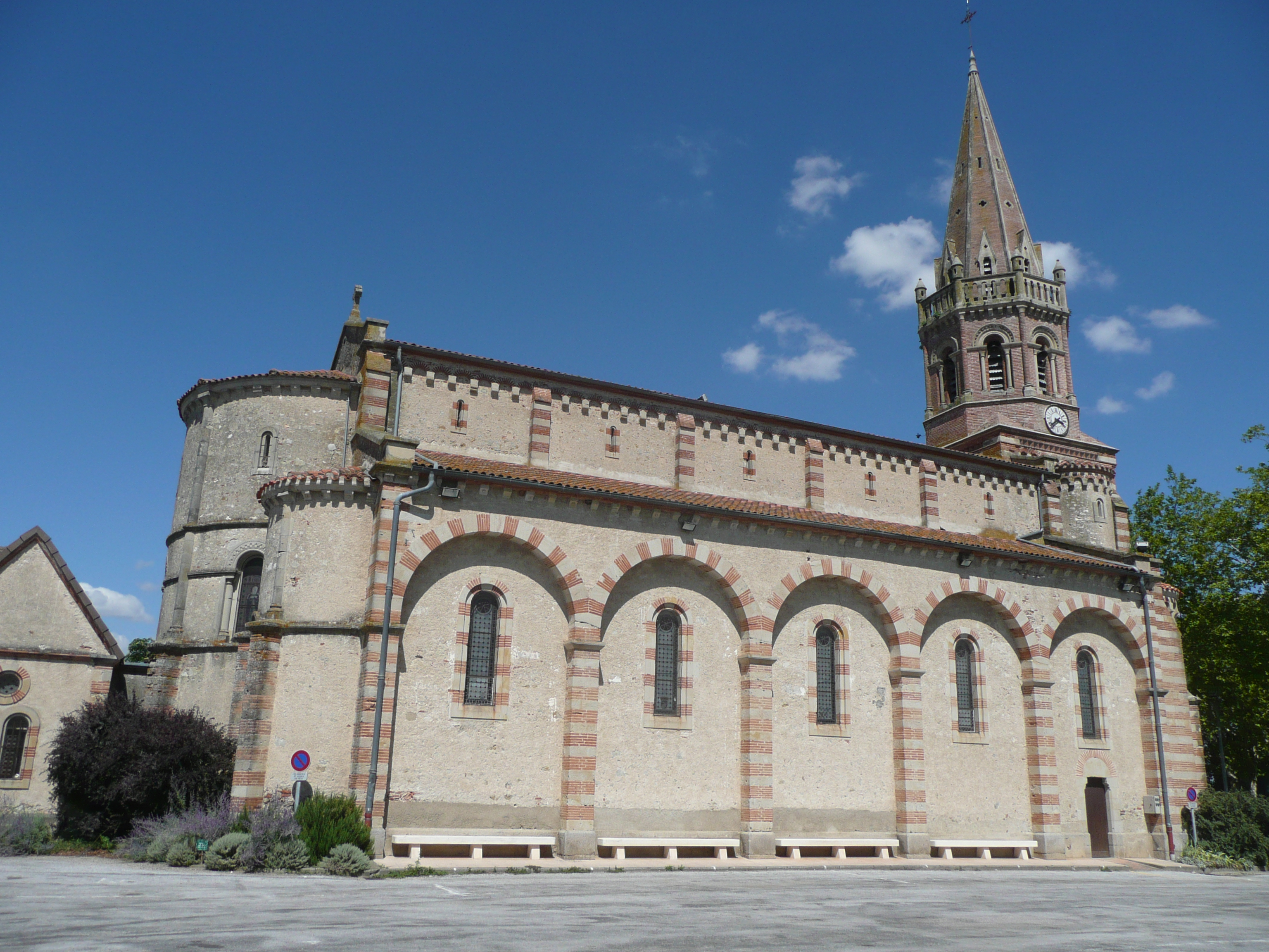 Église paroissiale de Saint-Paul-Cap-de-Joux (France), du XIXe siècle.